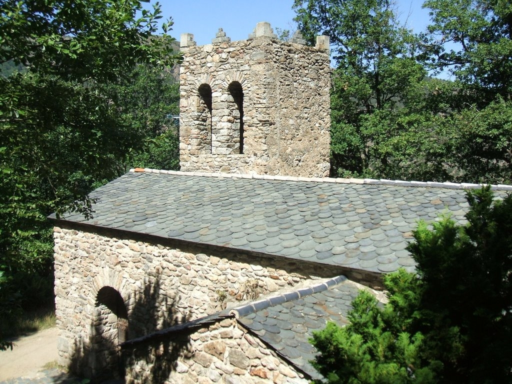 Casteil (Pyrénées-Orientales, France) : ancienne église paroissiale Saint-Martin-le-Vieux (XIIème siècle), restaurée en 1978.